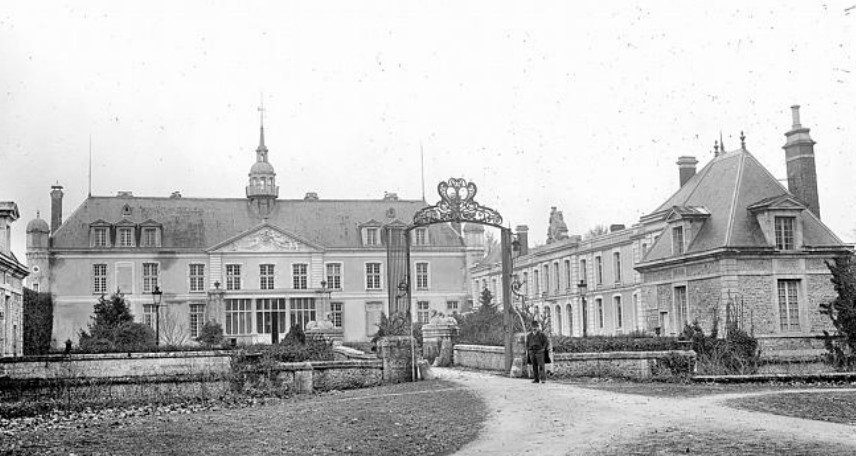 Château de Meslay-le-Vidame, Eure-et-Loir (France).